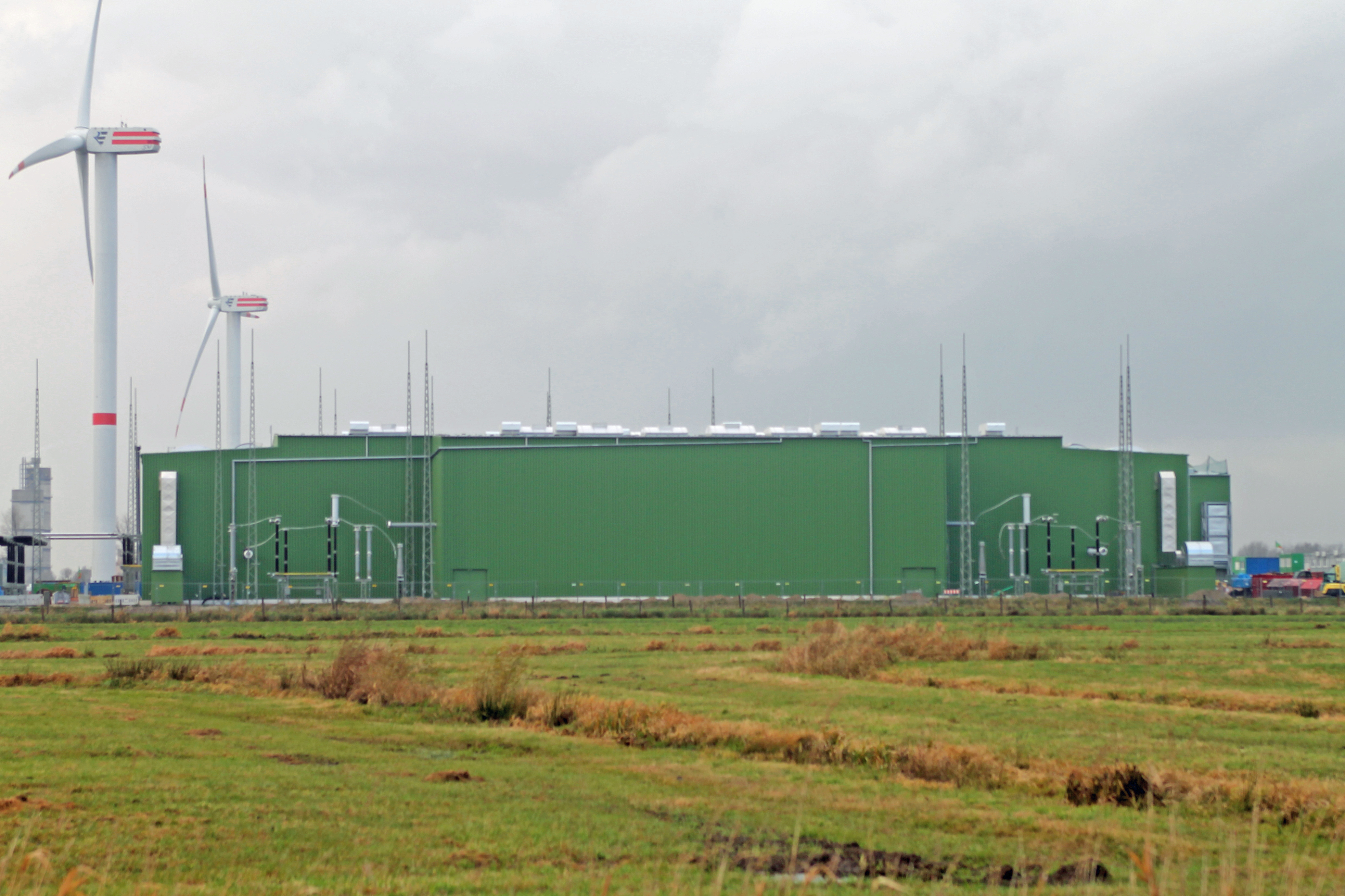 Stromrichterhalle Stromrichterstation Büttel